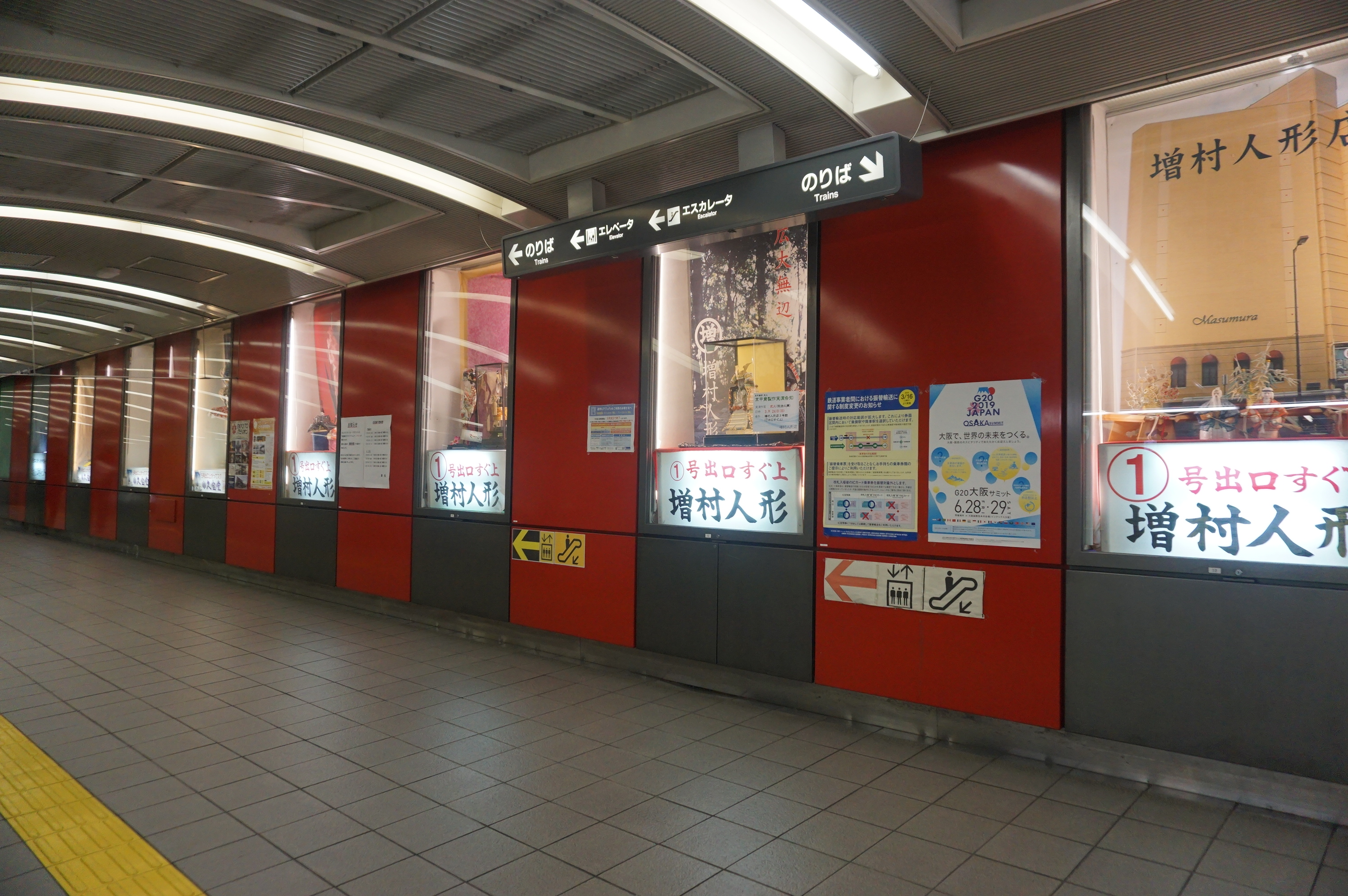 松屋町駅の改札内通路。 Sony ILCE-6000